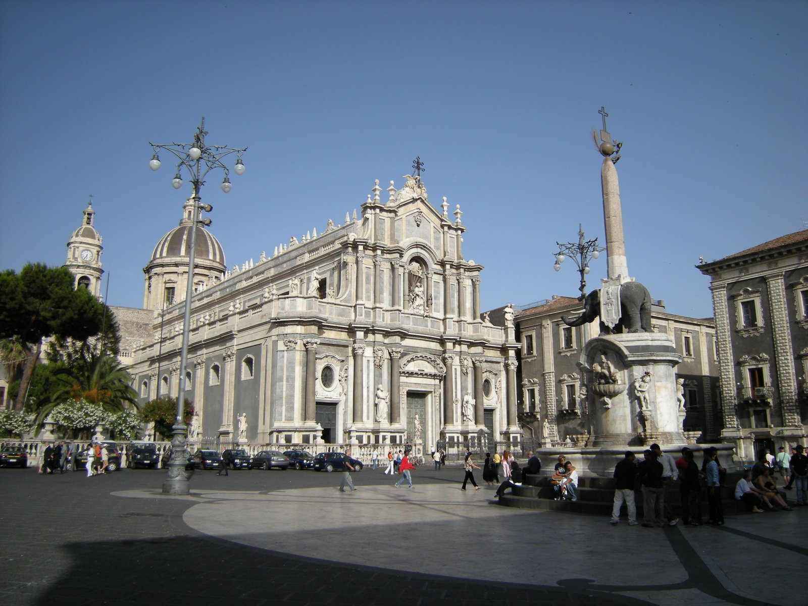 Catania - Piazza Duomo